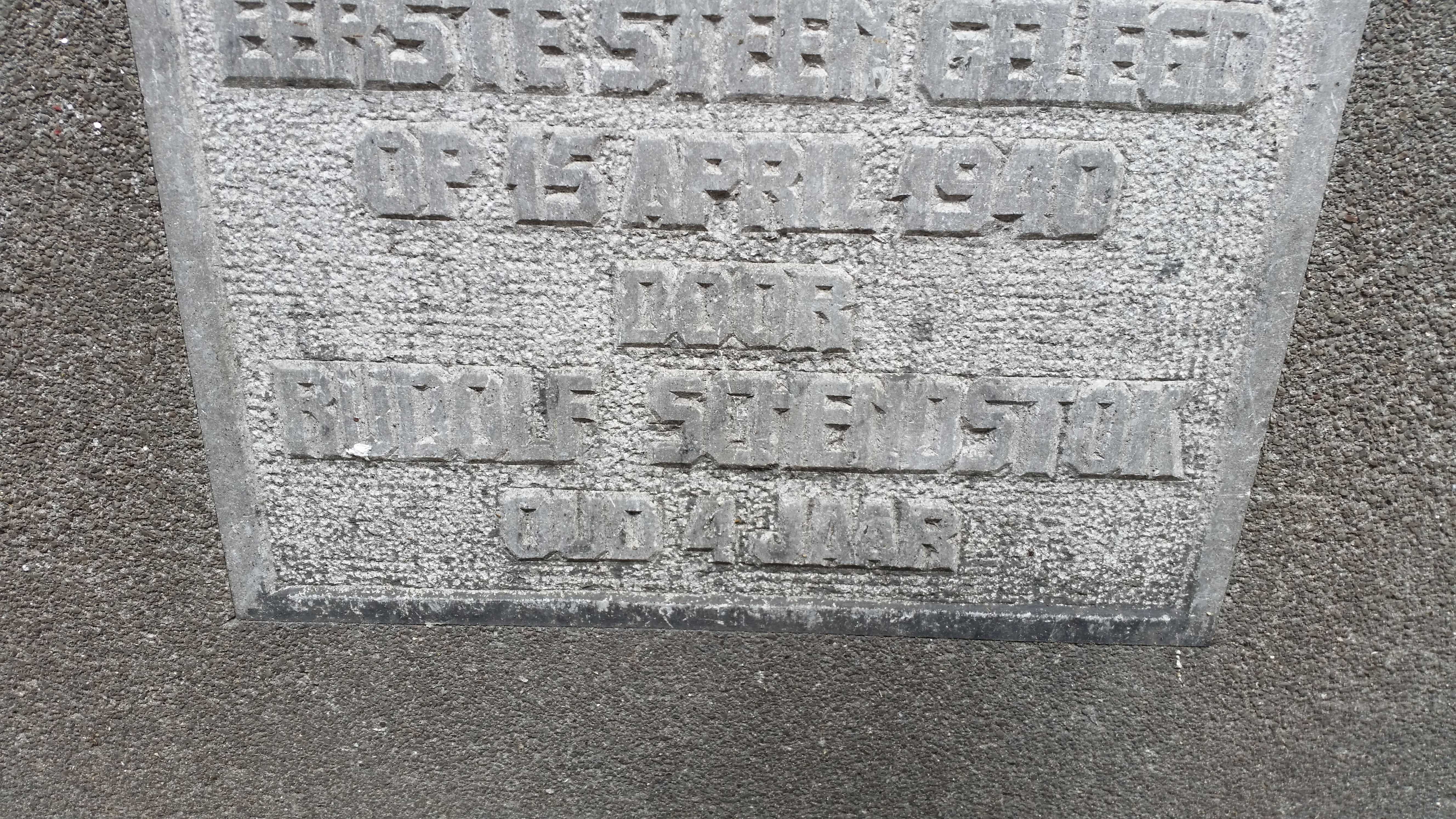 Impressie Fokke Simonszstraat 27-29, Amsterdam (juli 2020)